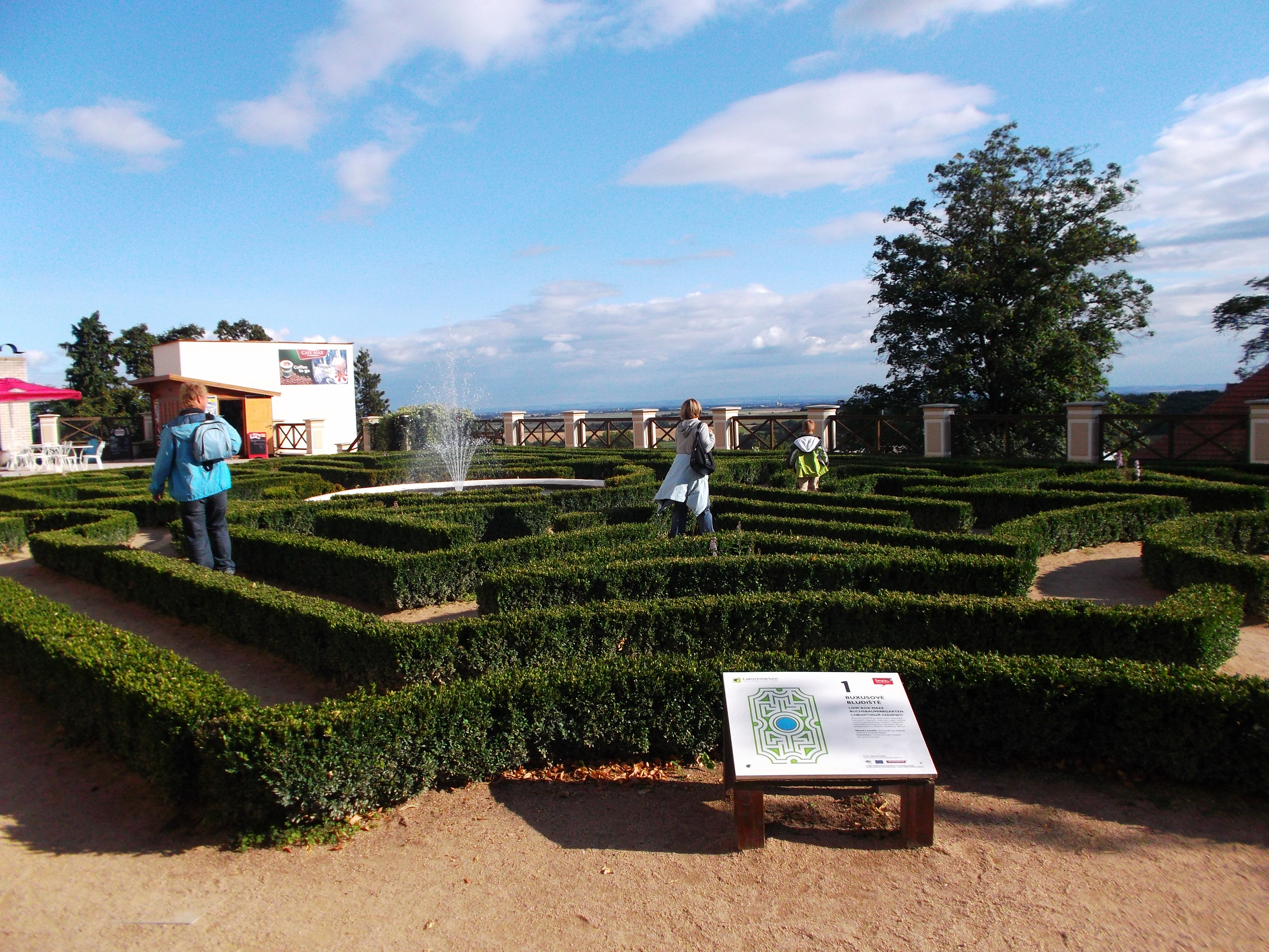 Buxusové bludiště v zámeckém parku v Loučeni. Bludiště číslo 1.